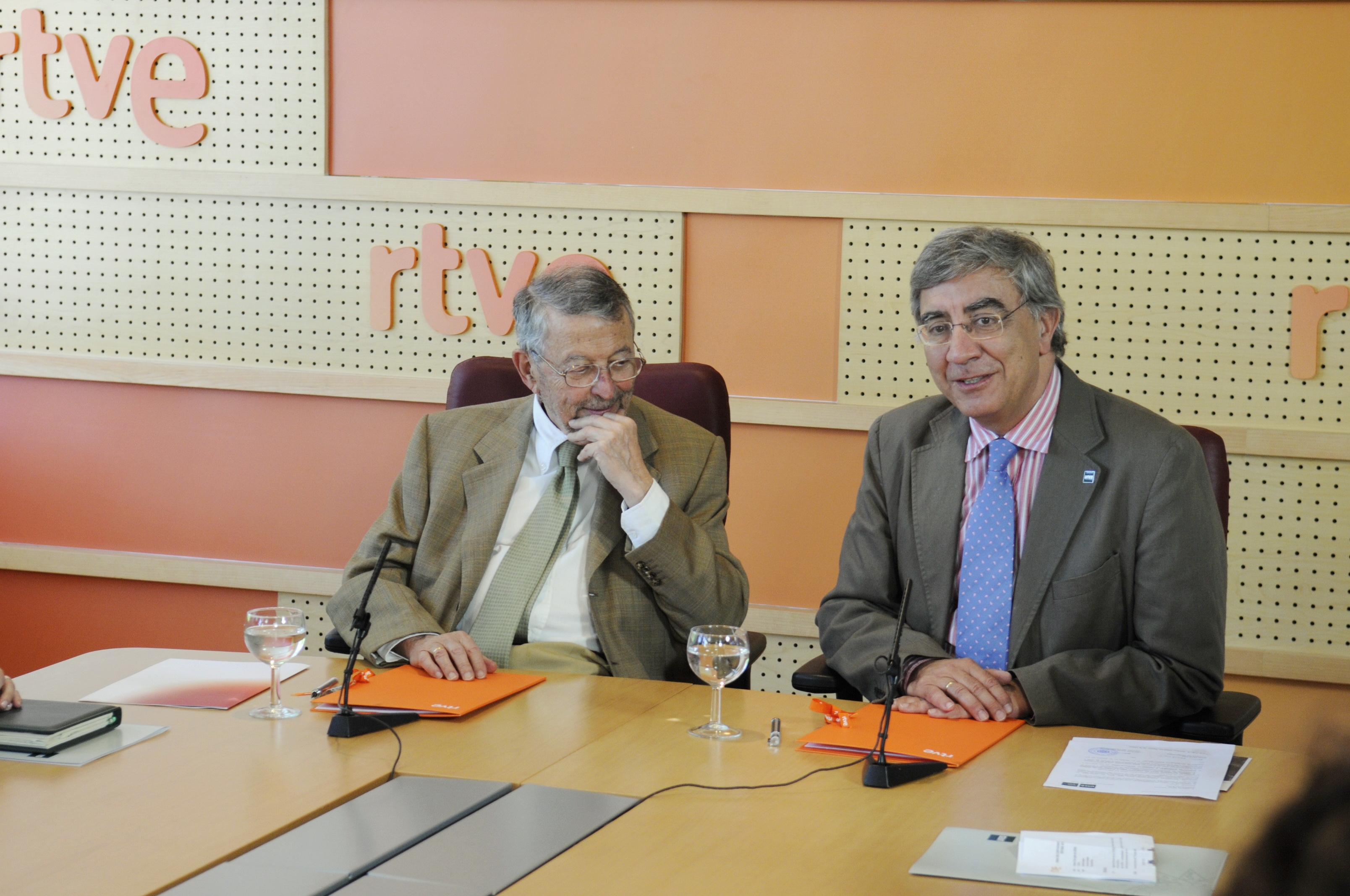 Alberto Oliart, presidente de RTVE y Juan A. Gimeno, rector de la UNED